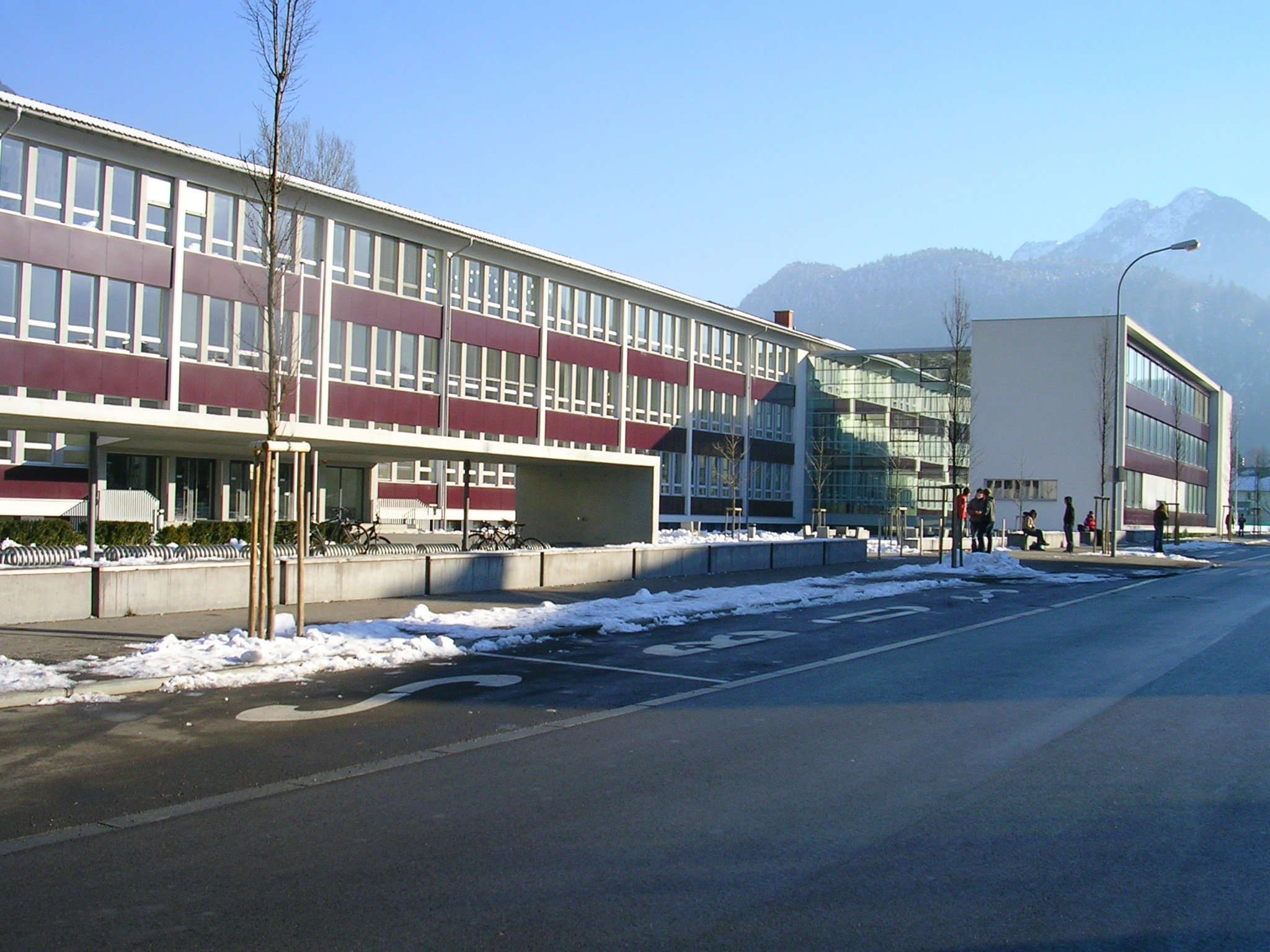 BG Bludenz